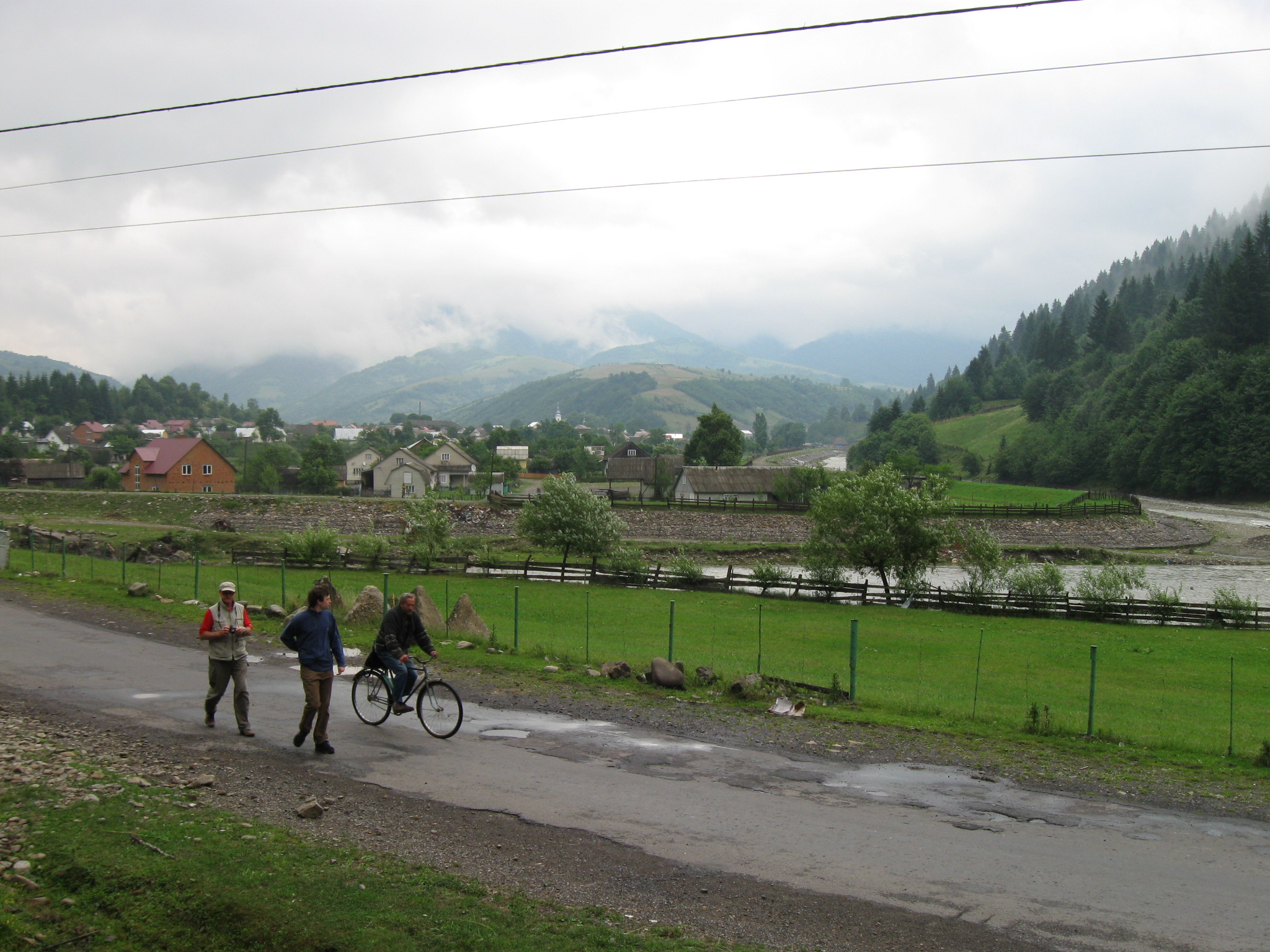 Koločava